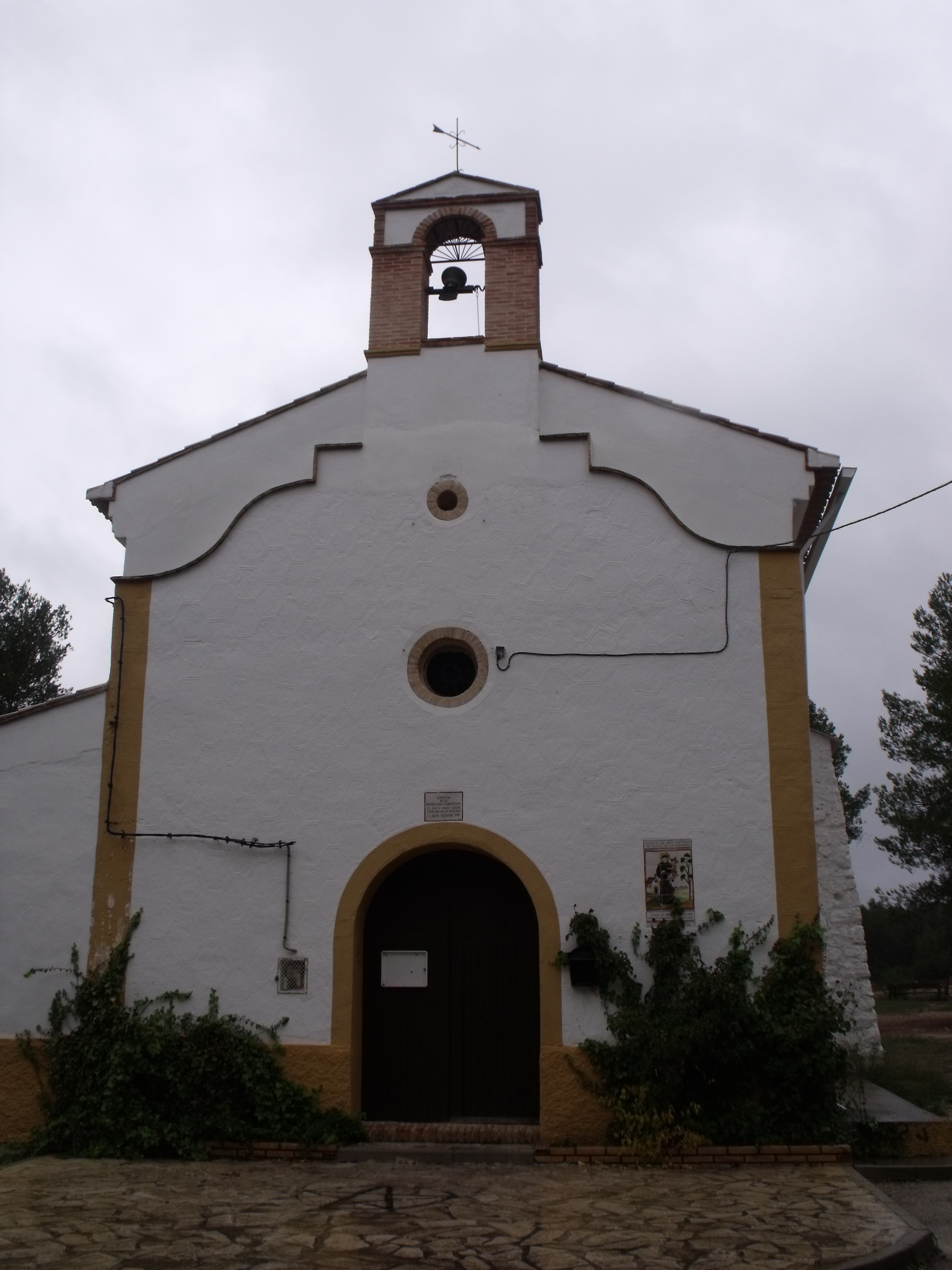 Vista de la Ermita de los Pedrones